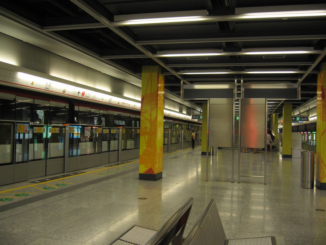 深圳地铁民乐站站台